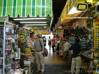 Description de l'image : Akihabara Source : Aoineko Statut : GFDL